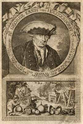 Georg Ernst von Holtzendorff (1714-1785), Preußischer Generalmajor und Inspekteur des gesamten Artilleriewesen